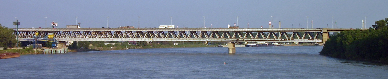 Hafebréck zu Bratislava